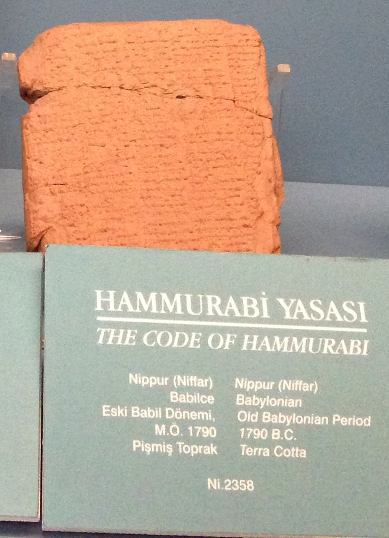 Hammurabi code Istanbul